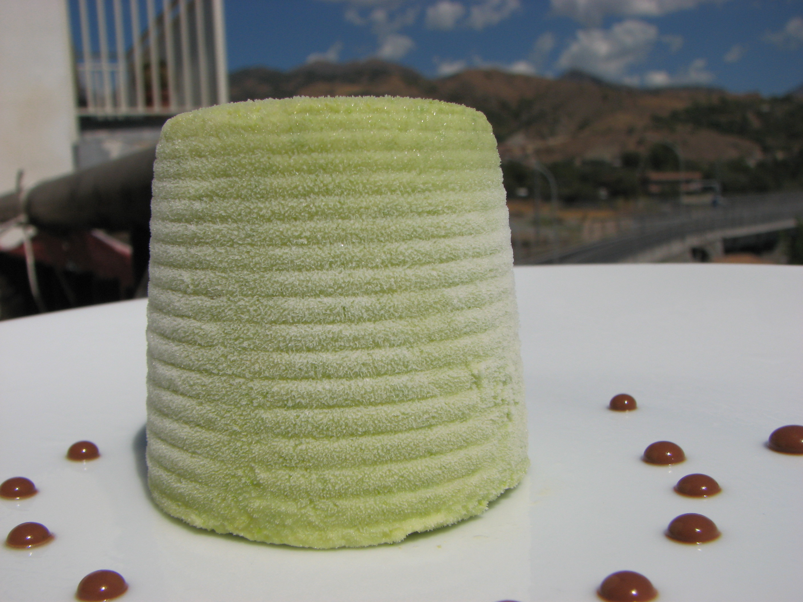 Semifreddo ai pistacchi di Bronte e salsa di Noir infini 99% di Michel Cluizel - Italia.